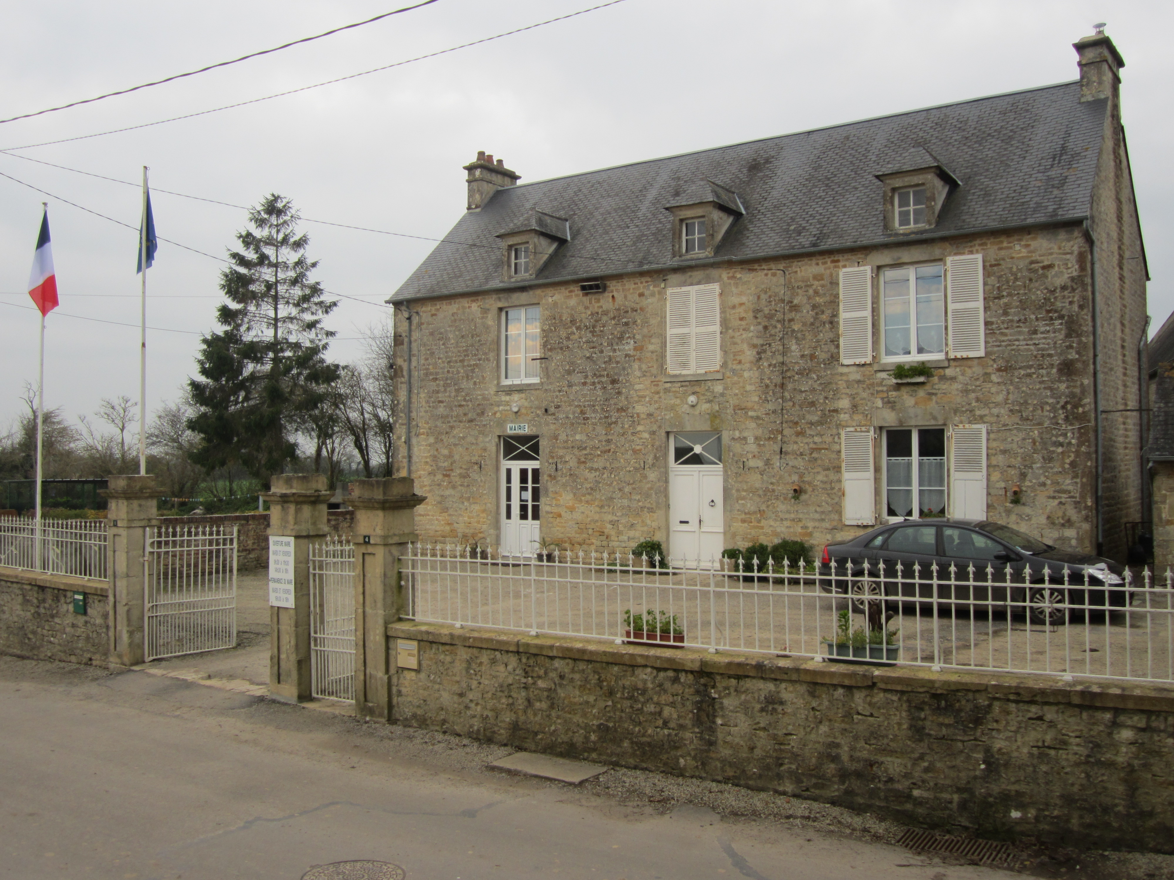 Carquebut, France